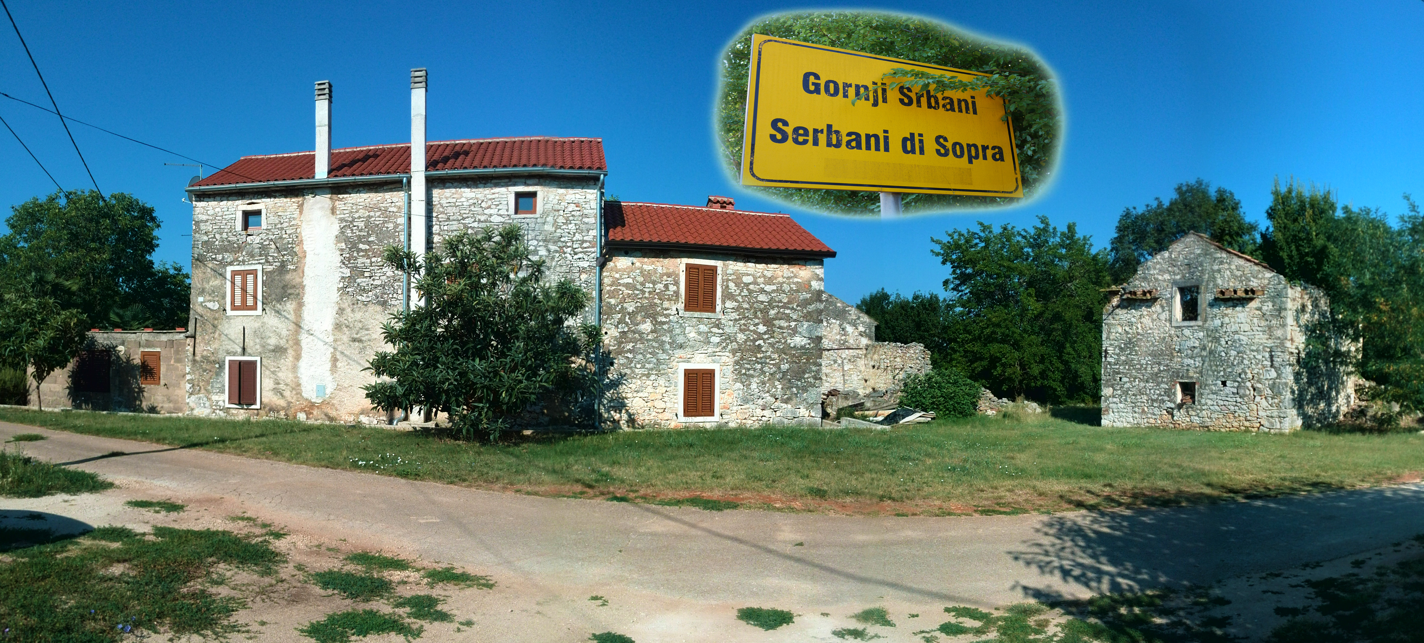 Srpski (latinica): Gornji Srbani (Istra)